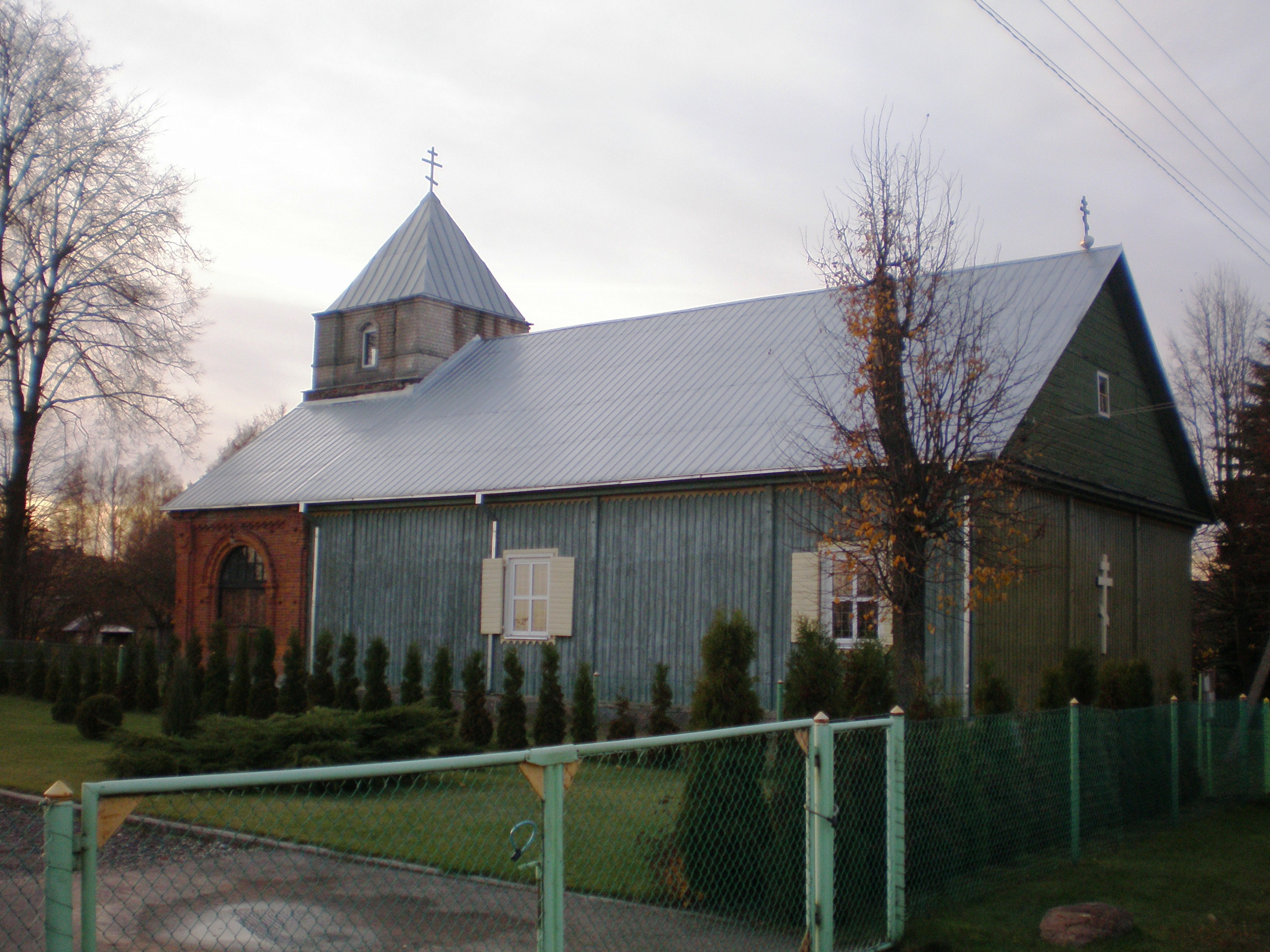 Stačiatikių cerkvė Didžiuosiuose Ibėnuose, Kauno raj.